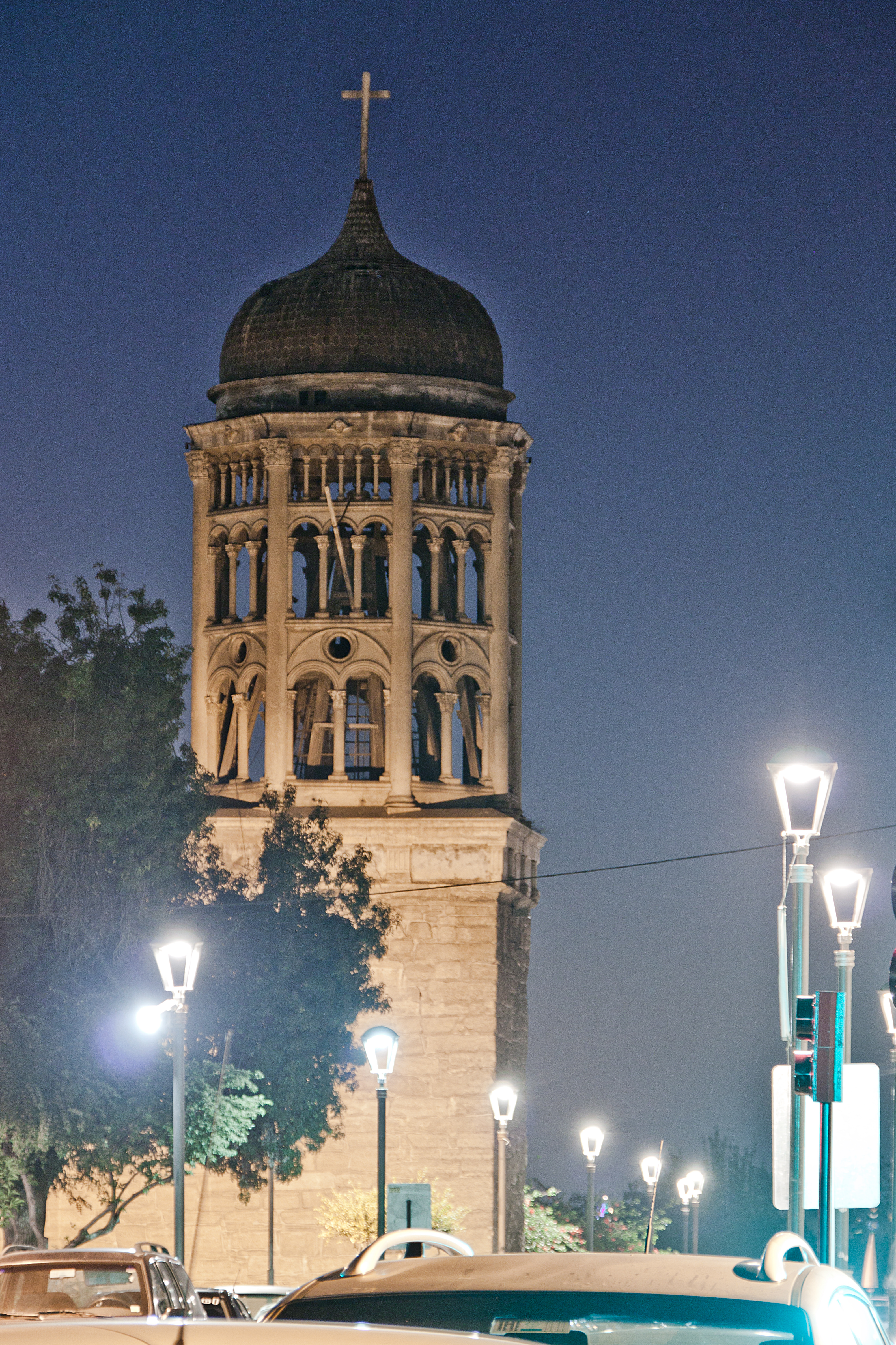 Iglesia de Santo Domingo This is a photo of a national monument in Chile: 447